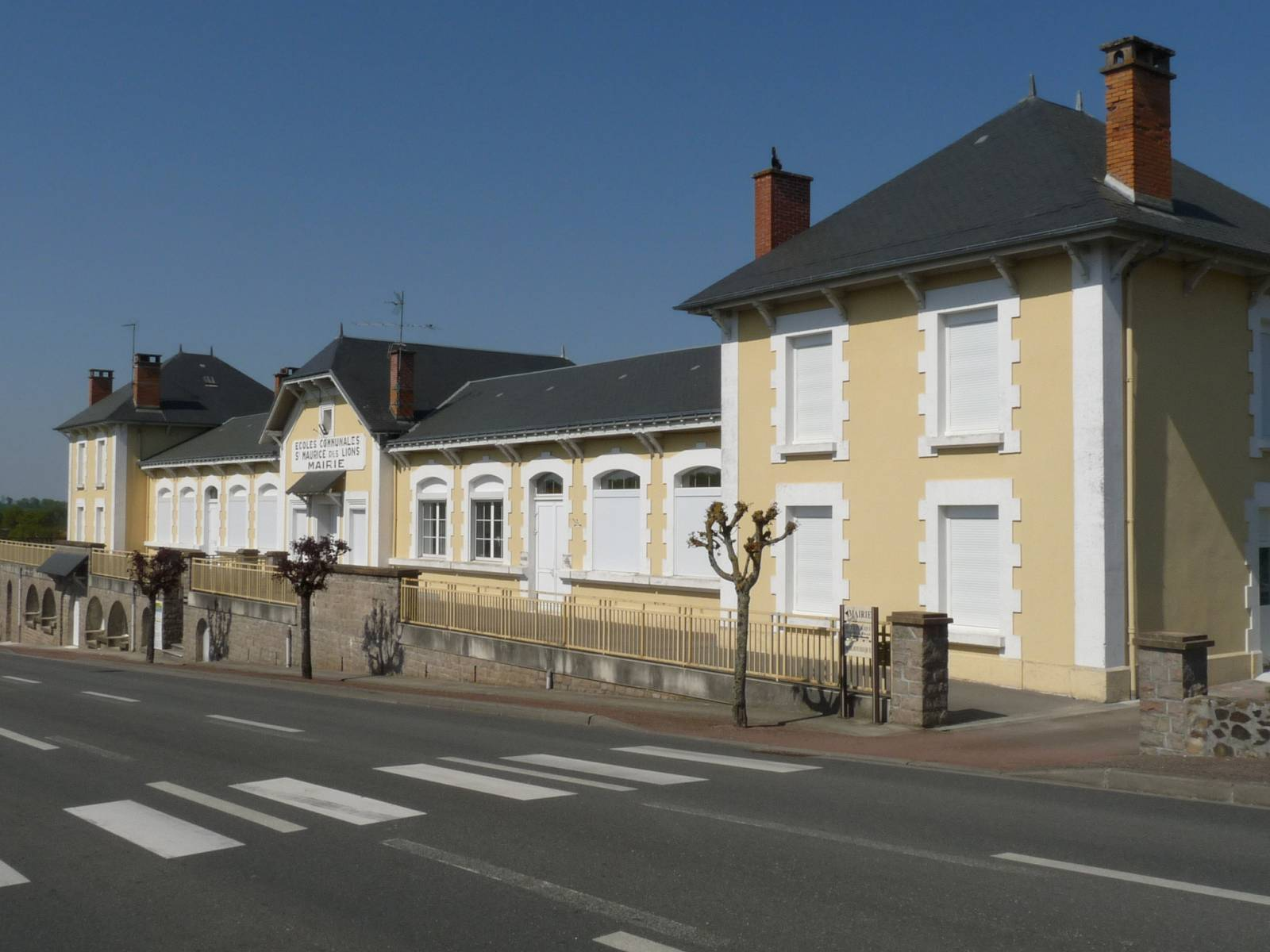 Ecole et mairie de Saint-Maurice-des-Lions, Charente, France